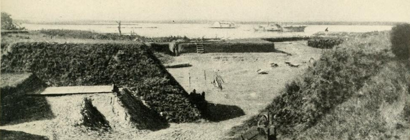 Fort McAllister p241